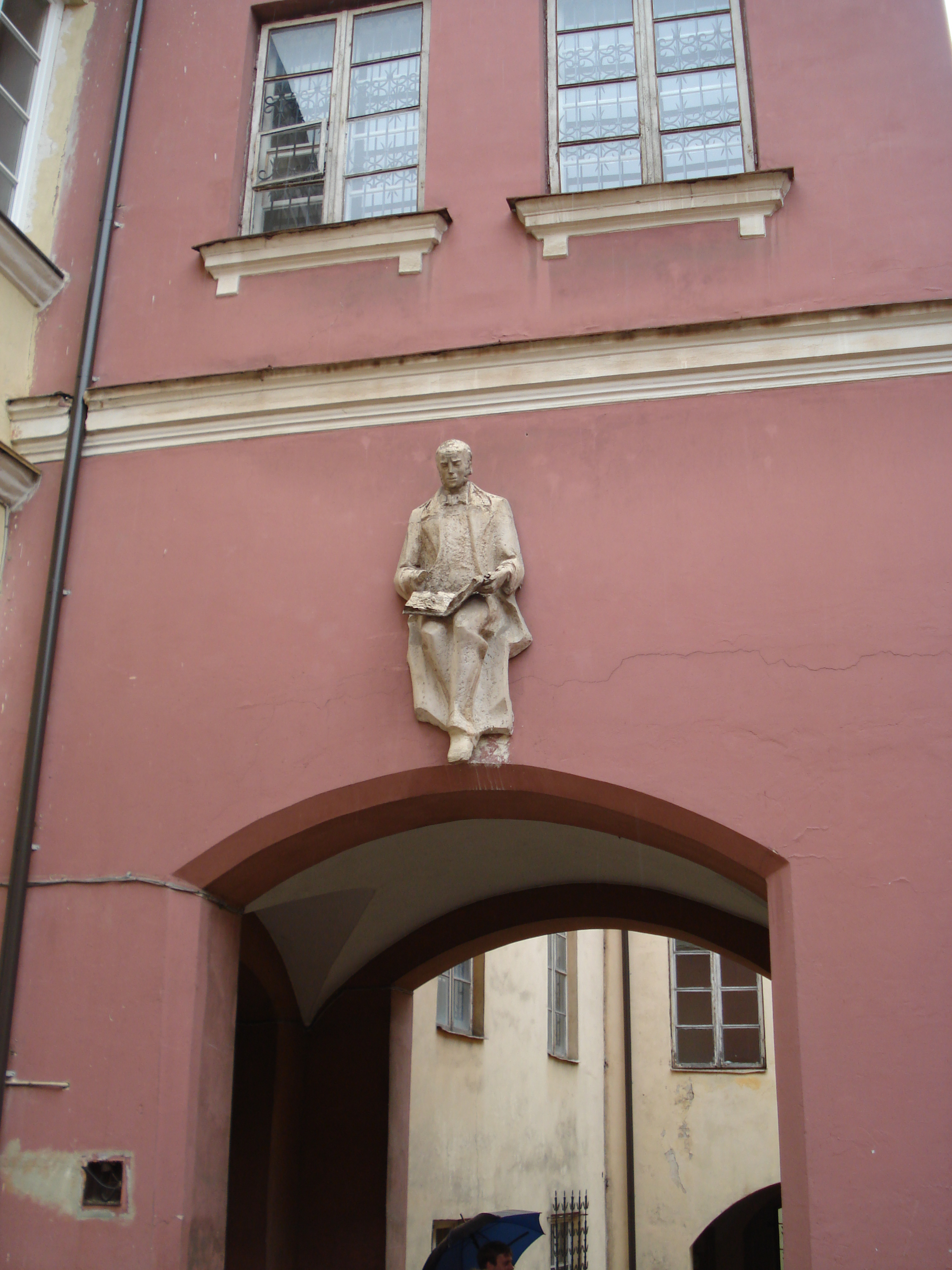 Simonas Daukantas (1793—1864) sculpture (by R. Kazlauskas) in Daukantas Courtyard (Vilnius university